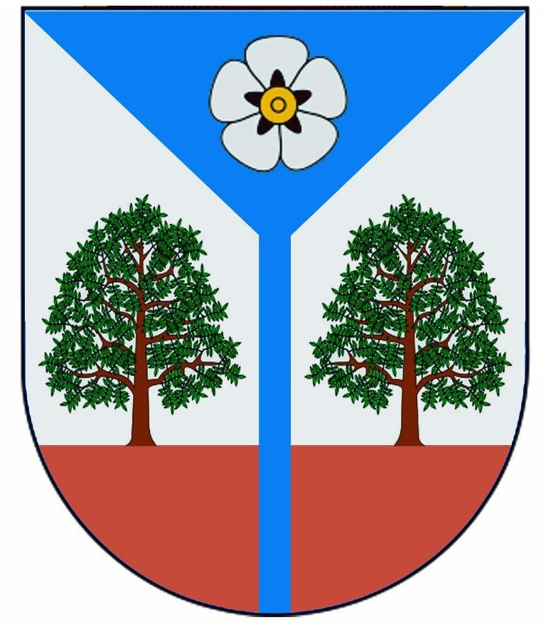 escudo